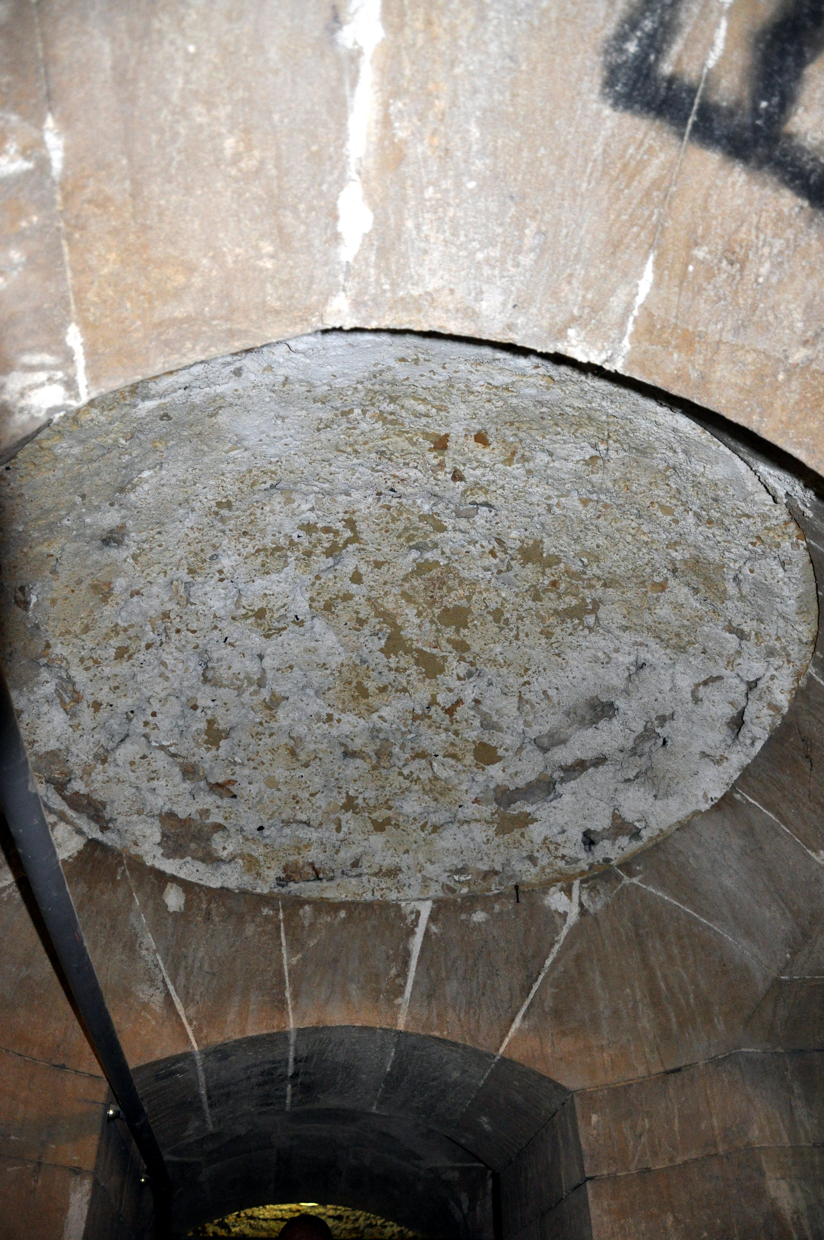 Emplacement des tables volantes dans les caves du Petit Trianon